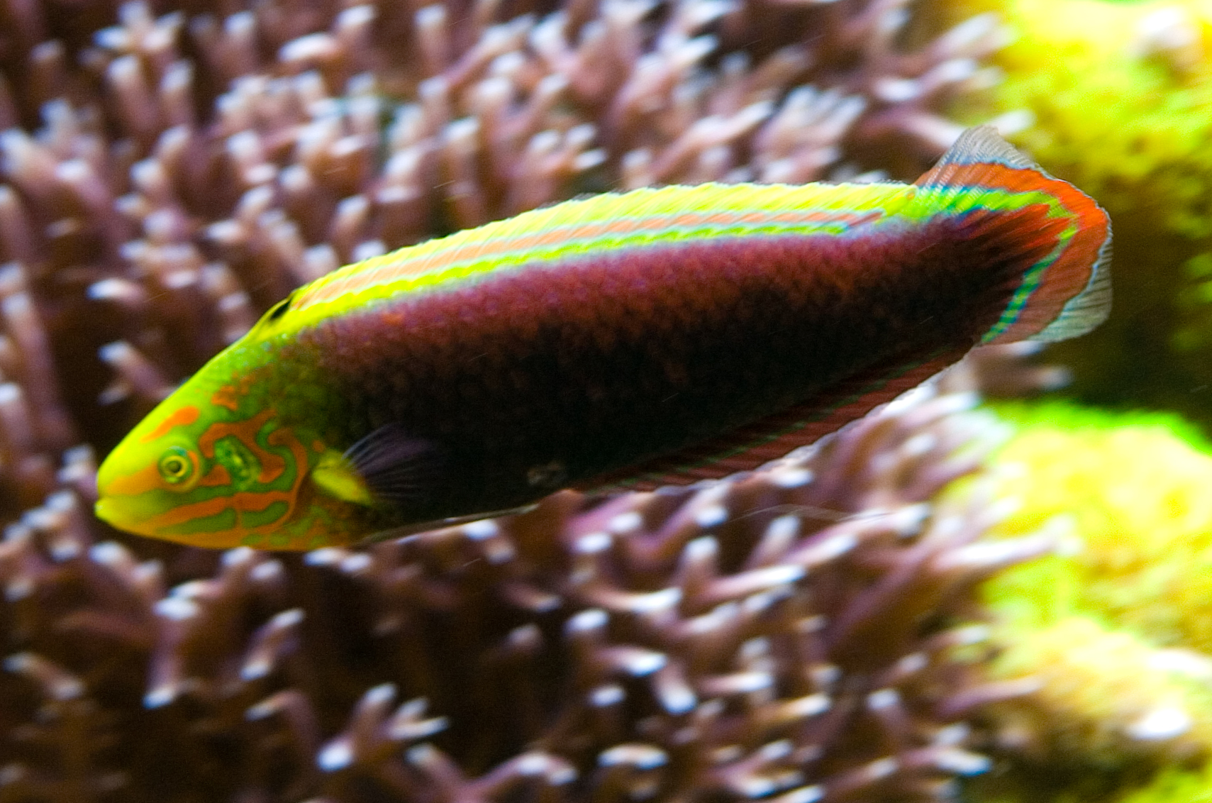 Gelbkopf-Junker (Halichoeres iridis)